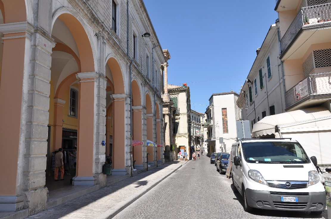 Penne (comune, Italy) 2012